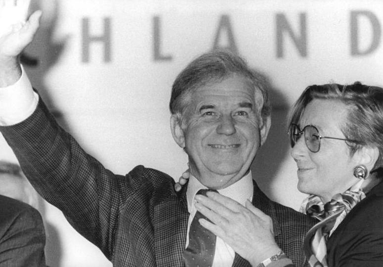 Dresden, Landtagswahl, Kurt Hans Biedenkopf ADN Matthias Hiekel 12.10.90 Dresden: Ein harter Wahlkampf geht auch für den CDU-Spitzenkandidaten in Sachsen Kurt Biedenkopf, hier mit seiner Frau Ingrid, zu Ende. Abgebildete Personen: Biedenkopf, Kurt Prof. Dr.: Ministerpräsident von Sachsen, CDU, Bundesrepublik Deutschland